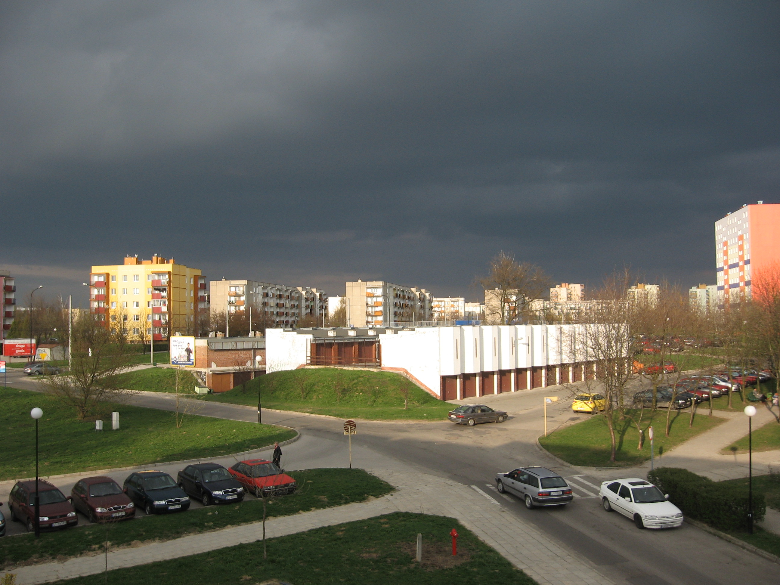 Osiedle Łęgi - wiosna